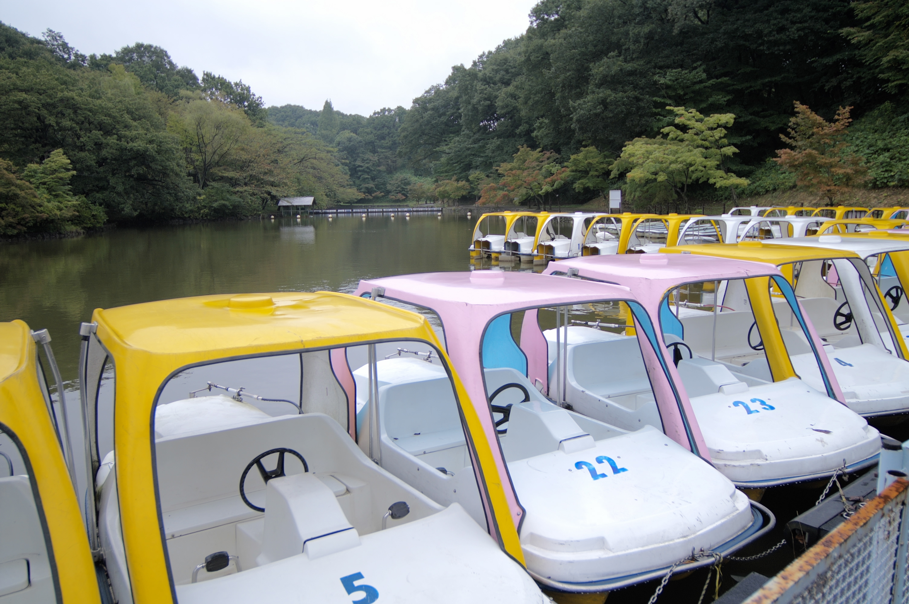 こどもの国 白鳥湖 (神奈川県横浜市青葉区)